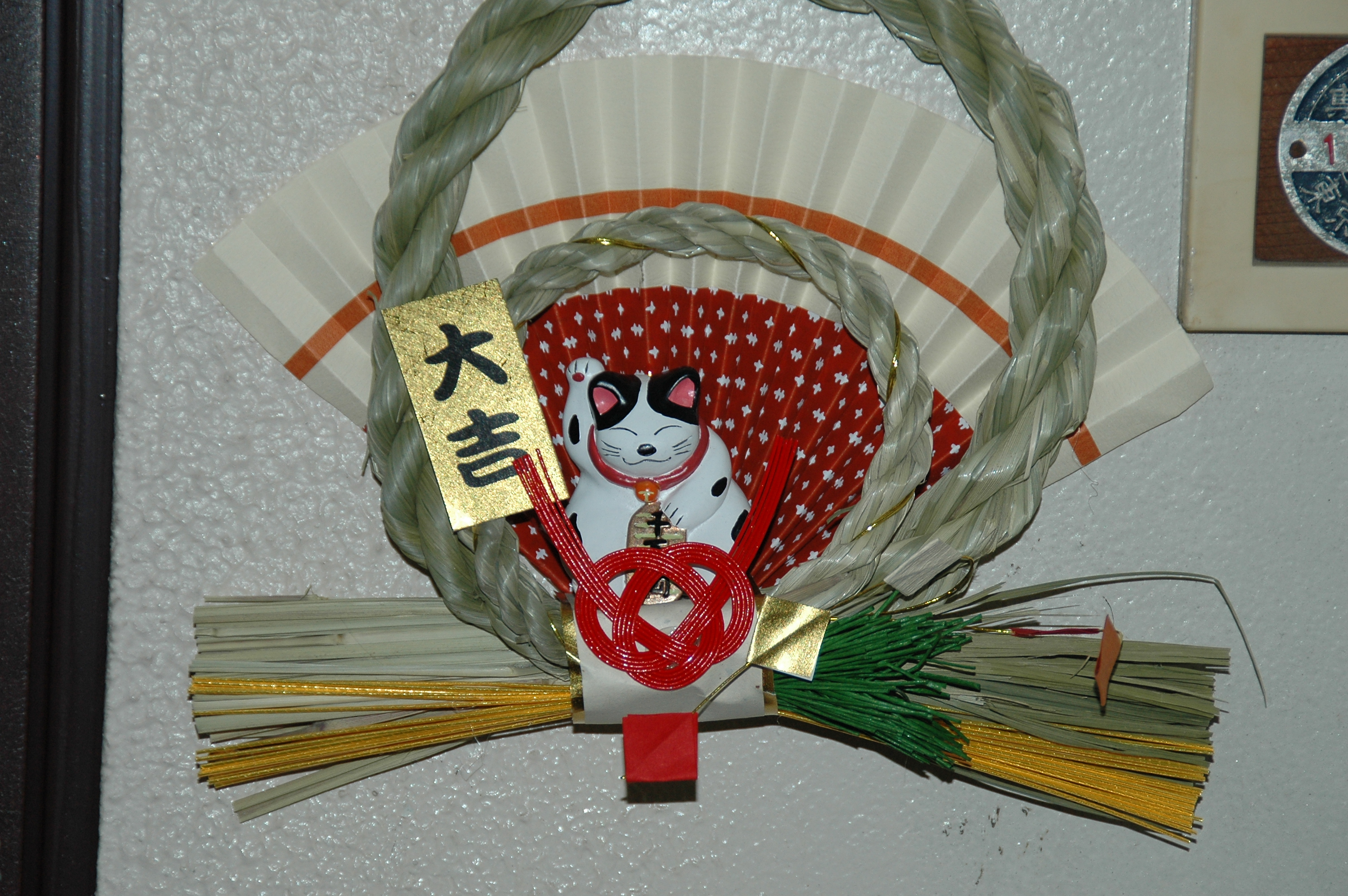 大吉招き猫。福よこいこい2007年！